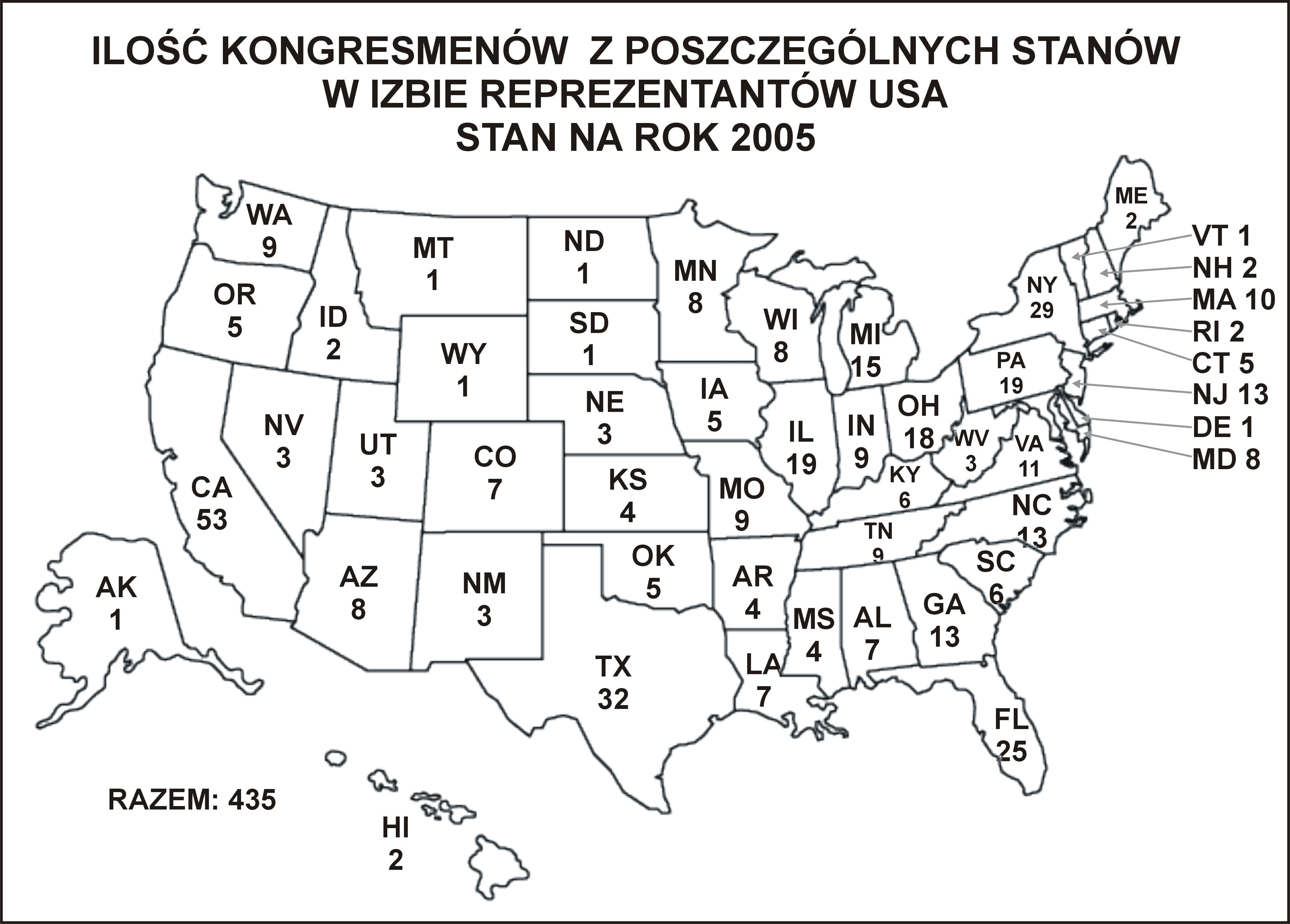 Schemat przedstawia ilość miejsc w Izbie Reprezentantów dla przesstawicieli poszczególnych stanów. Scheme represents number of seats in Hous of Representatives for states in the US.